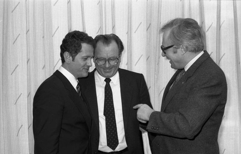 04.02.1983 Konferenz der Ministerpräsidenten der Bundesländer in der Landesvertretung Rheinland-Pfalz.